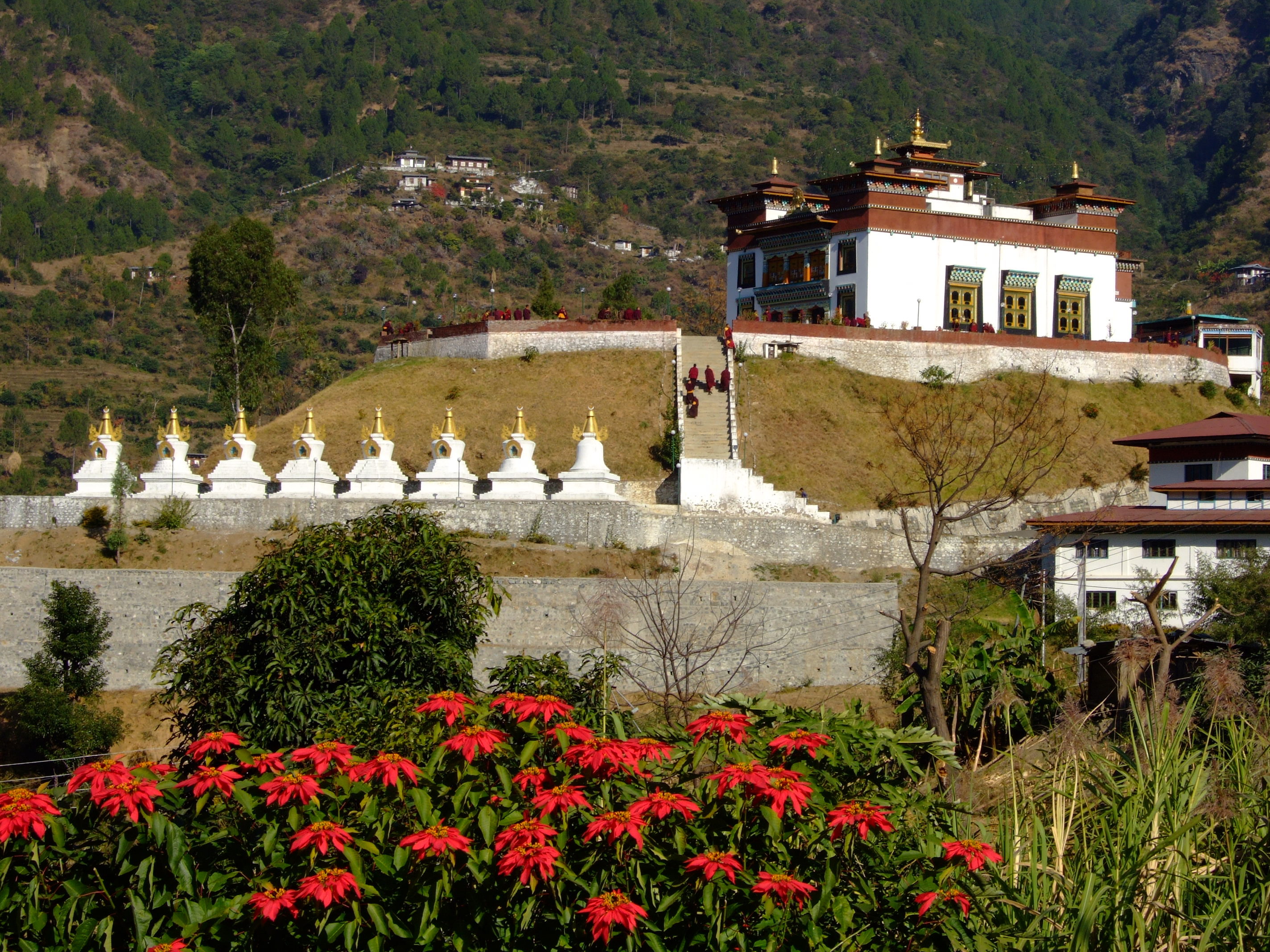 Zangdok Pelri Temple, Rangjung Ösel Chöling monastery, Rangjung, Tashigang District, Bhutan